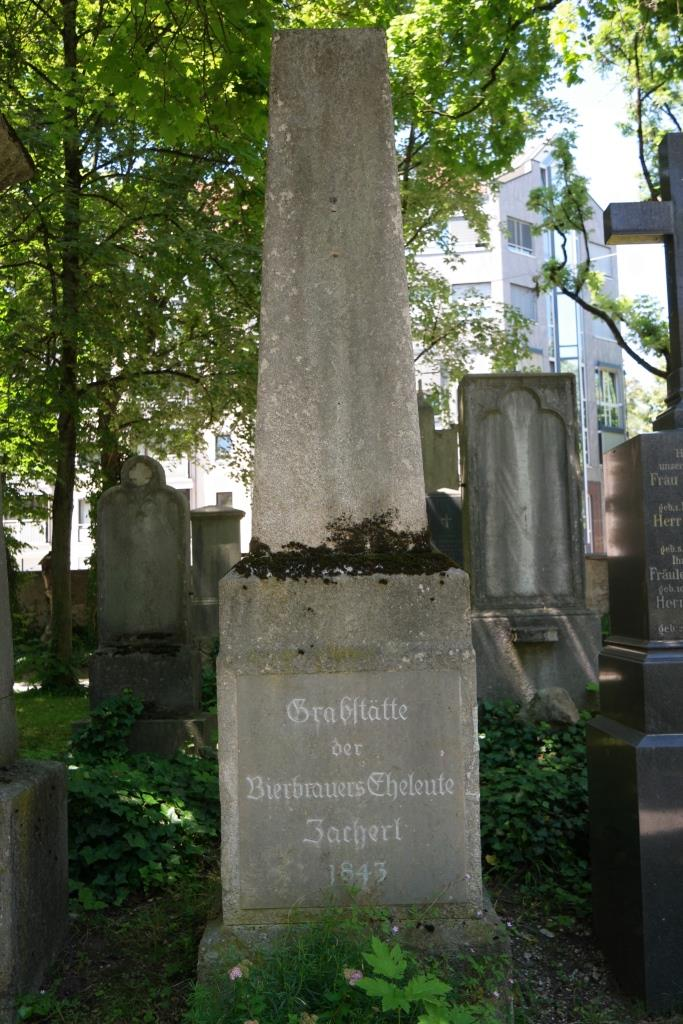 Grab des Brauereibesitzers Franz Xaver Zacherl (1772-1849) auf dem Alten Südlichen Friedhof in München